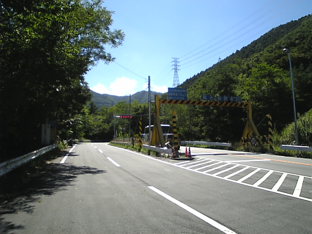 国道137号と山梨県道708号の分岐